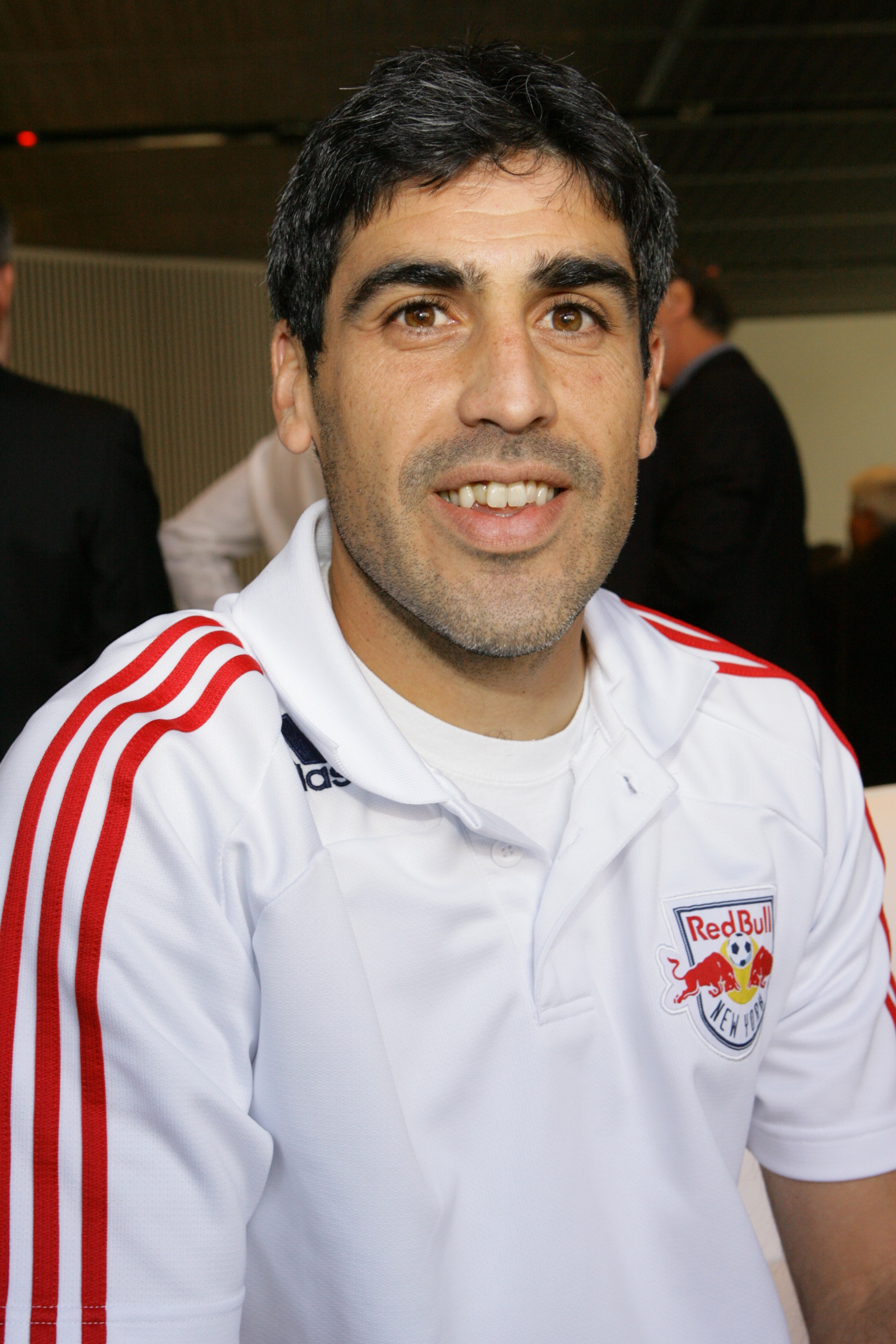 Claudio Reyna